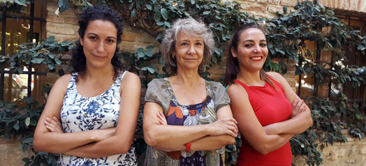 Laura Alonso, Julia Barella y Benayga Pérez ganadoras del Premio a la Transferencia Escuela de Escritura de la Universidad de Alcalá.